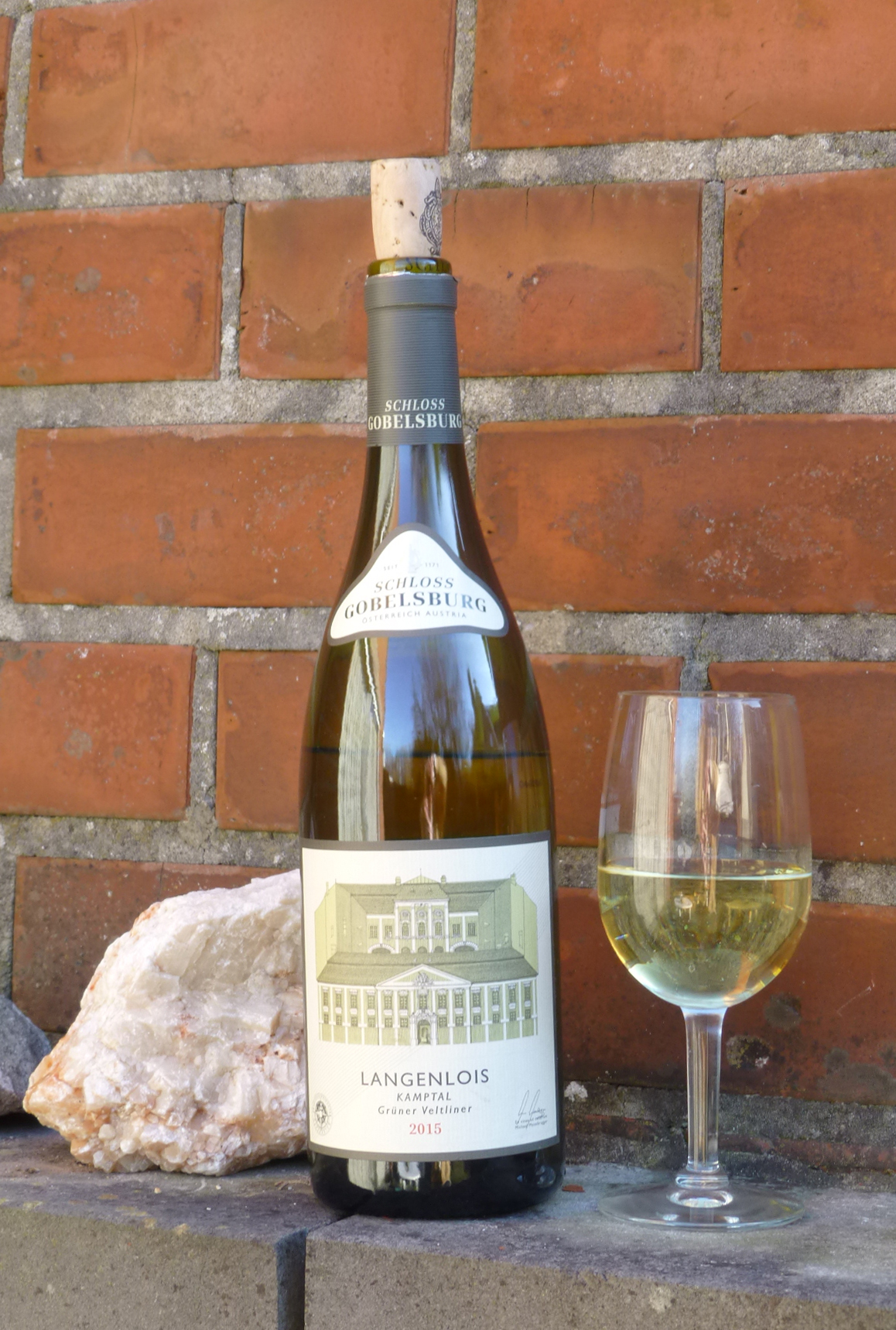 Millésime 2015 d'un vin de la Kamptal, cave du château de Gobelsburg, Basse Autriche.